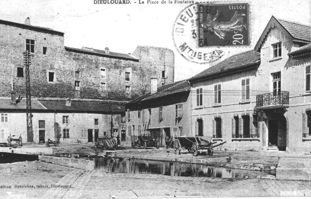 Le Château de Dieulouard (Meurthe-et-Moselle) sur une carte postale de 1924. Catégorie:Image de commune de Meurthe-et-Moselle